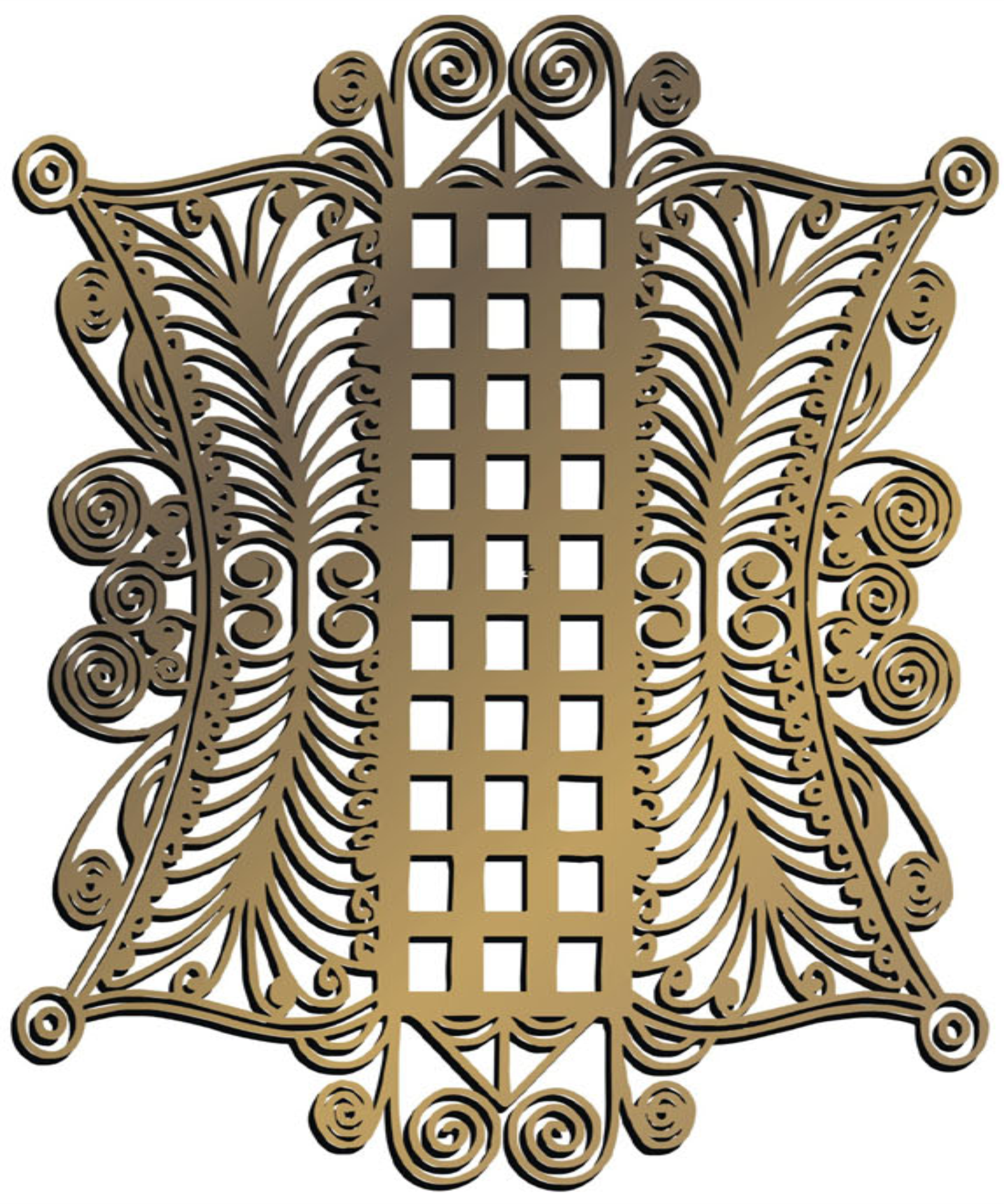 Ragam hias pinto aceh khas Aceh